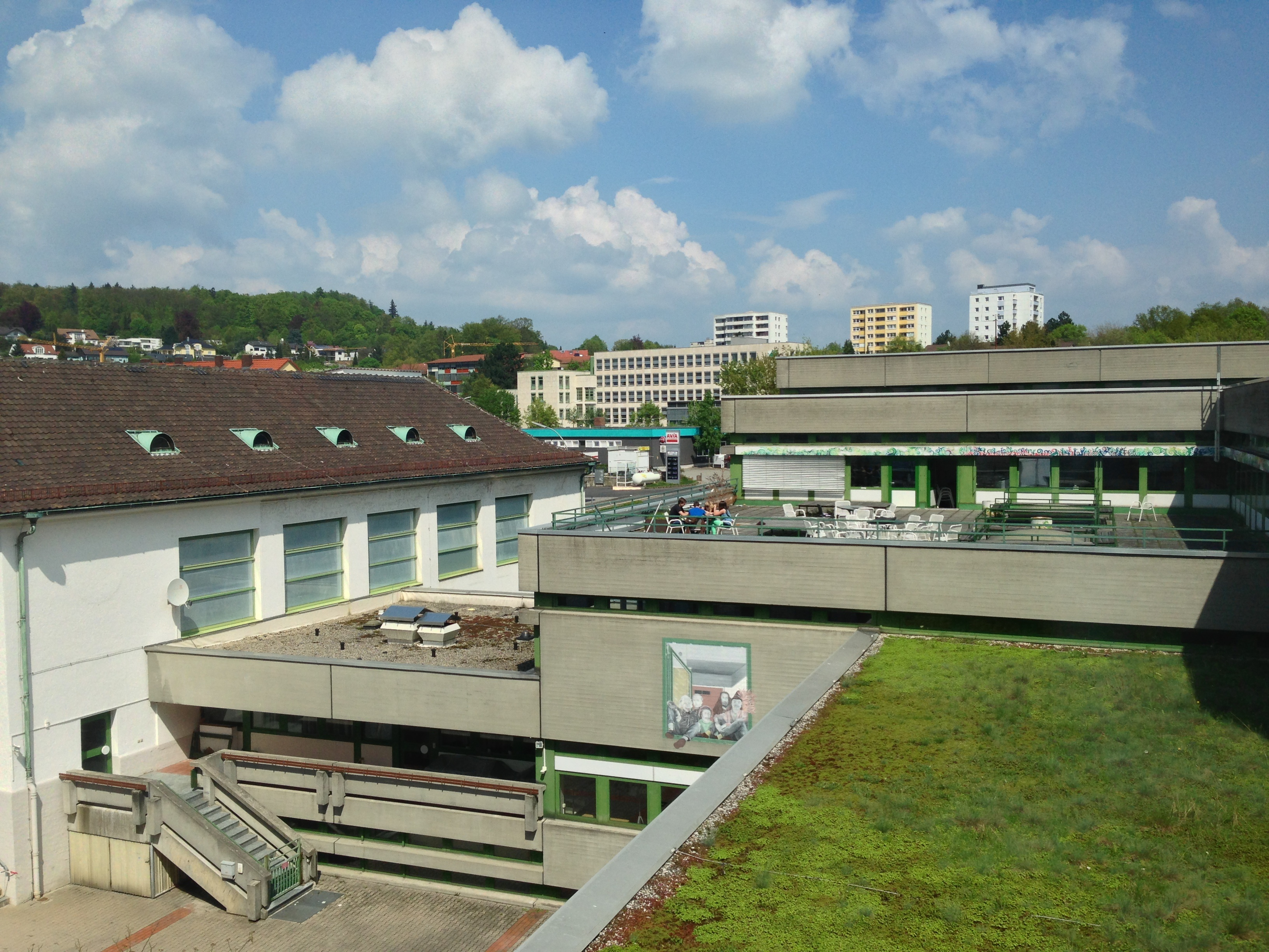 Gregor-Mendel-Gymnasium Amberg, Blick auf die Dachterrasse der Oberstufe